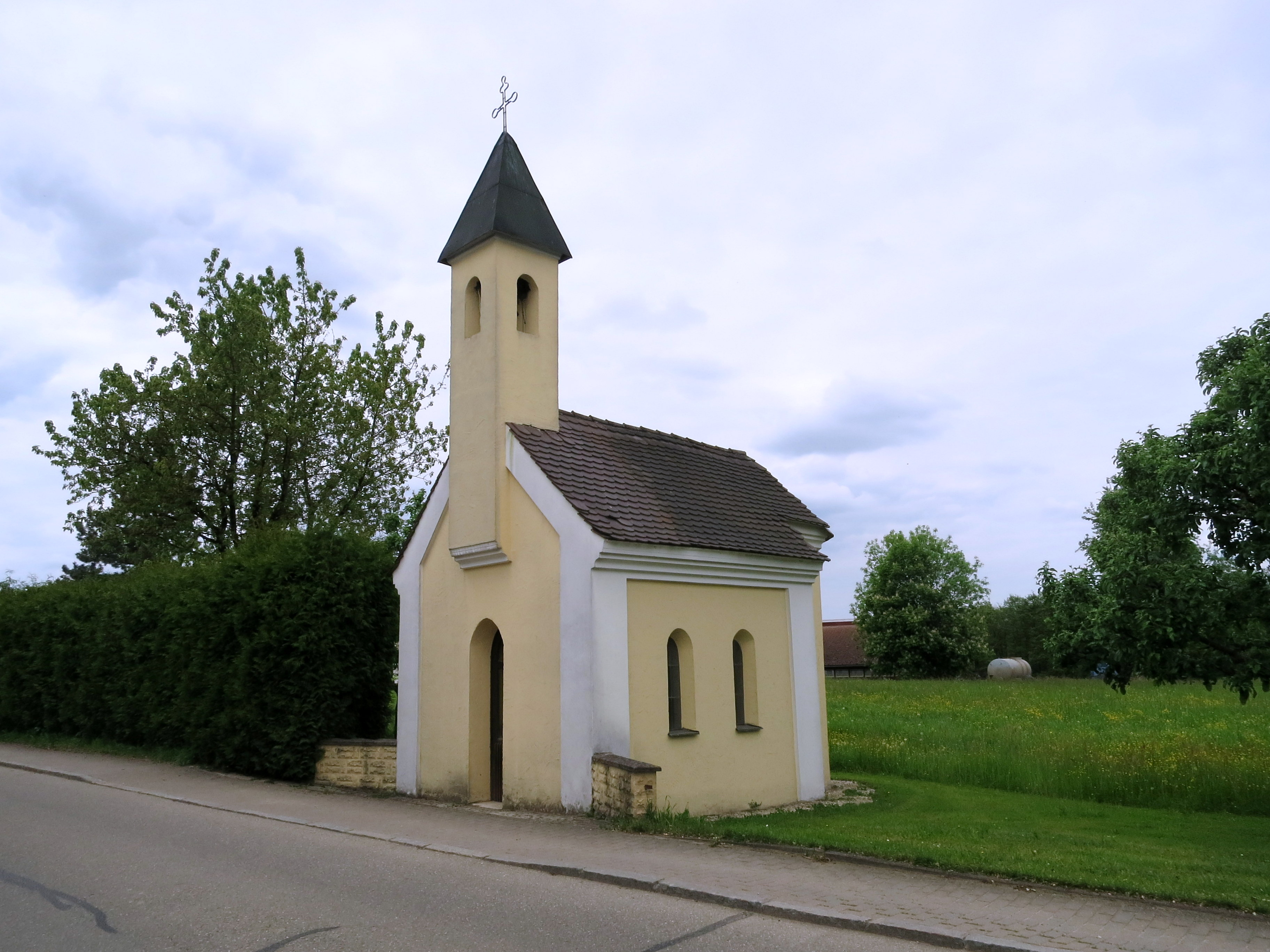 Eine kleine Ortskapelle aus dem 19. Jahrhundert